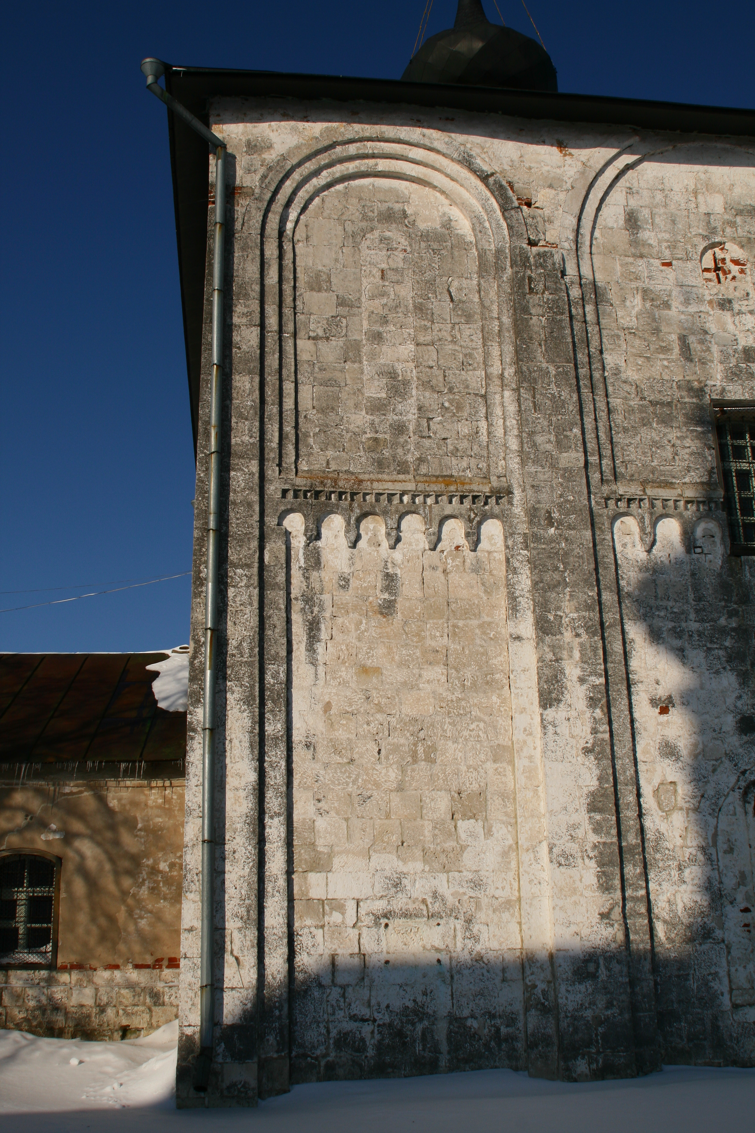 Западное прясло южной стены. Прясло стены храма Бориса и Глеба в Кидекше. XII век.